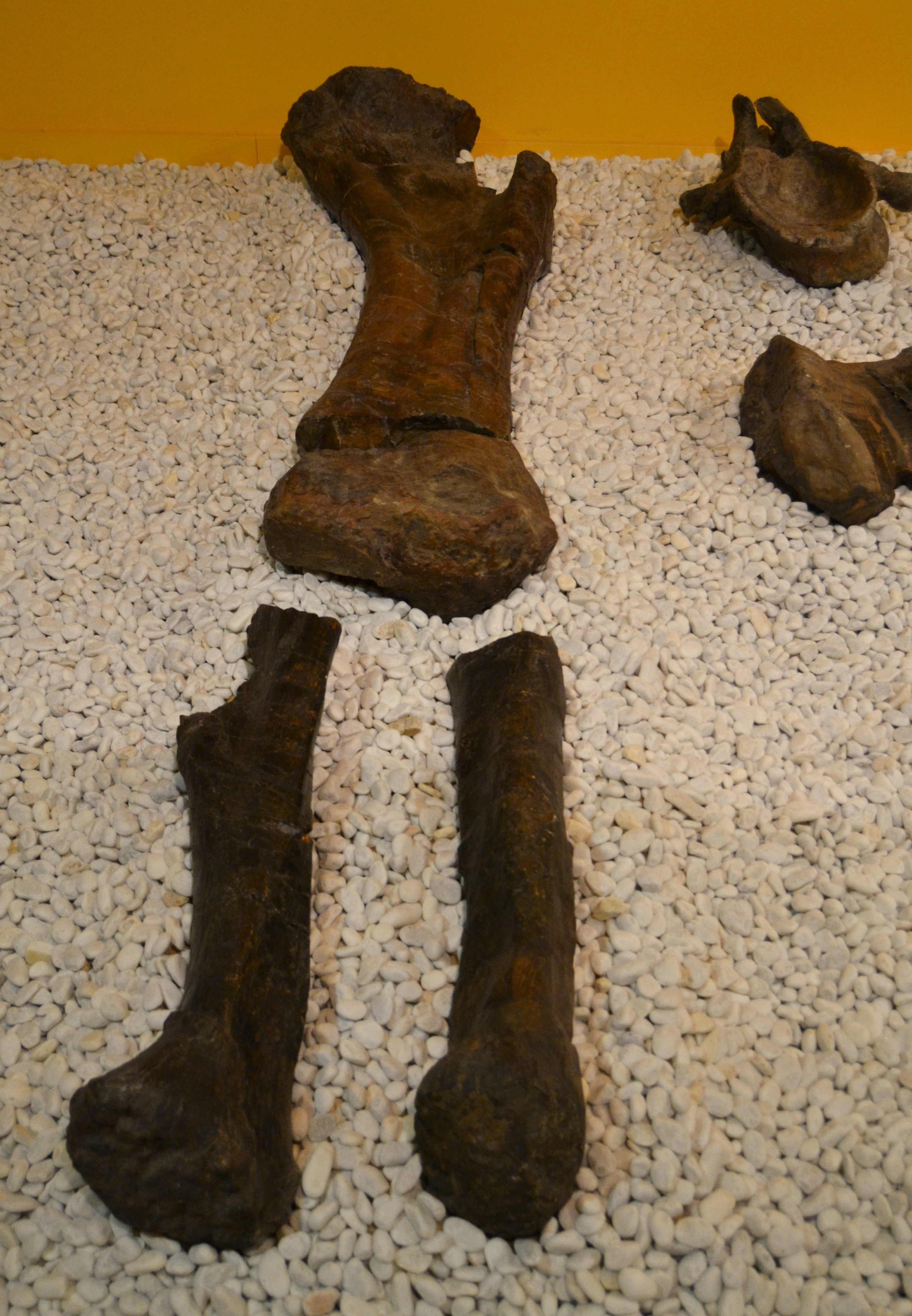 Húmer, radi i ulna de Losillasaurus giganteus, Museu de Ciències Naturals de València. Jaciment de Losilla i Collado de Alpuente (Juràssic superior 163 - 144 milions d'anys).